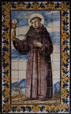 San Juan de Sahagún. Retablo cerámico del siglo XVII, del convento de Santa María del Pópulo de Sevilla, hoy en el Museo de Bellas Artes.